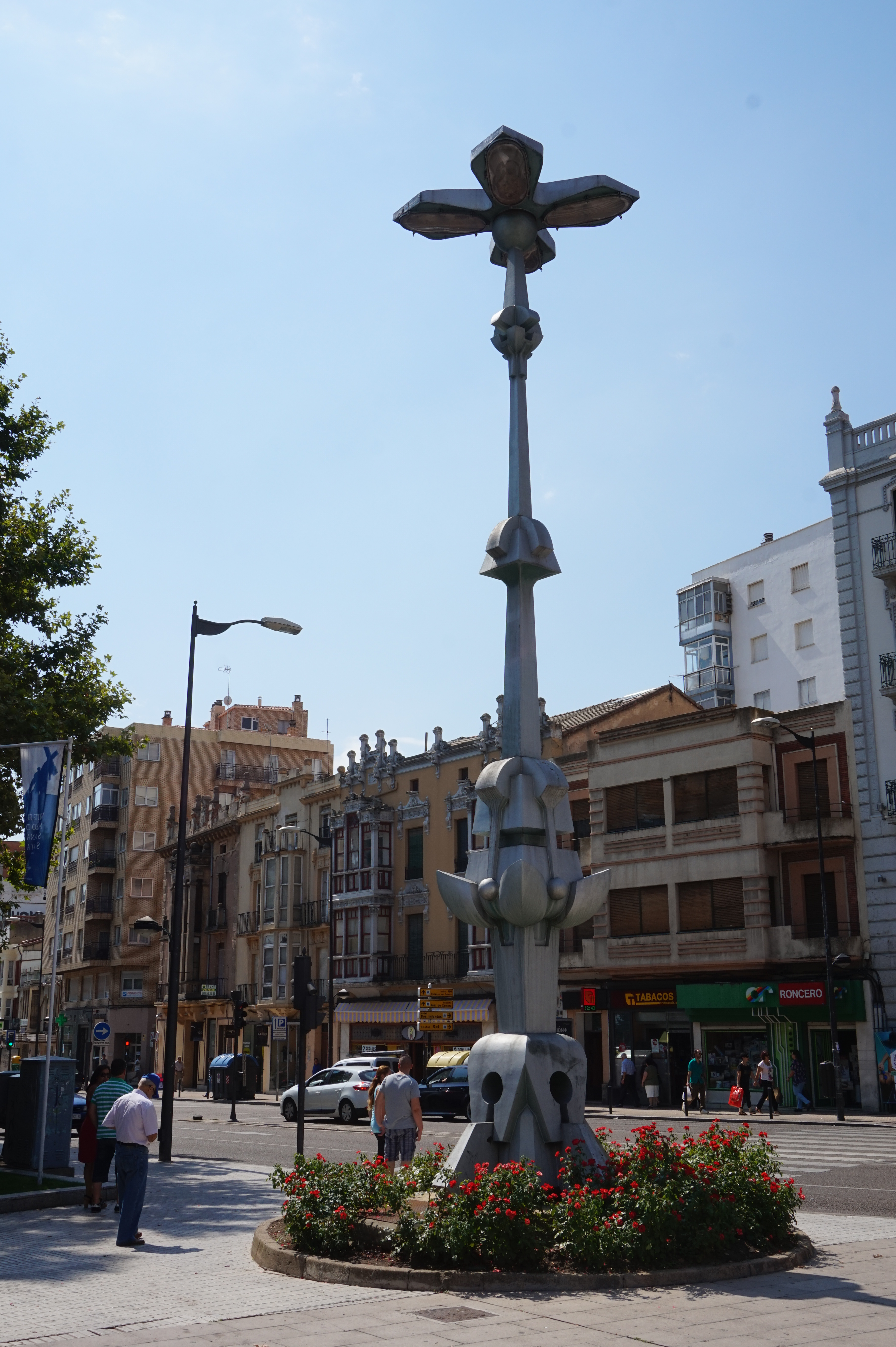 Es desde 1979, “La Farola”, obra del escultor zamorano José Luís Coomonte. Estado en 2015